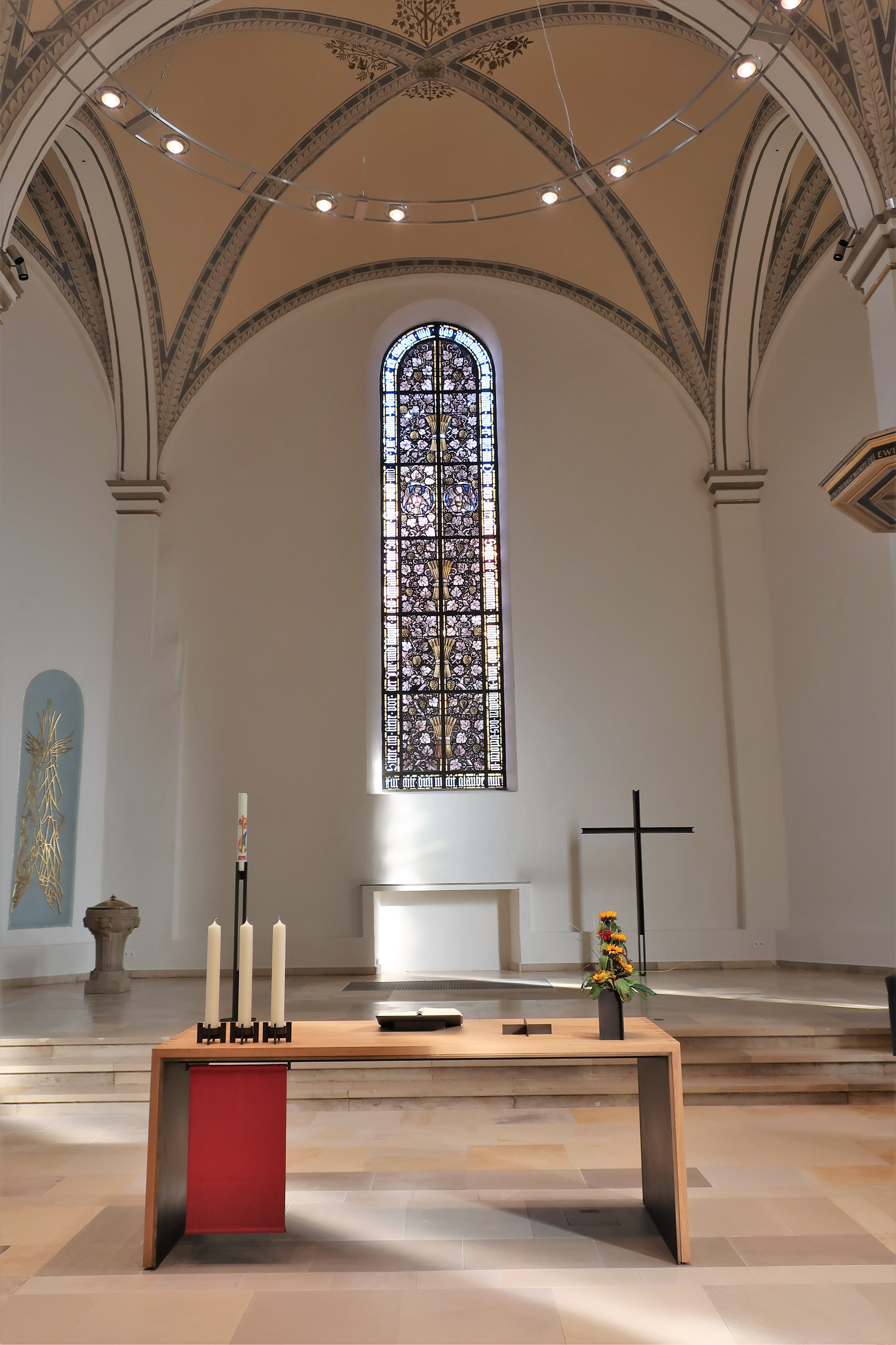 Ev.-luth. Johanniskirche am Markt in Hagen. Blick in den Chor mit Altartisch und Weihwasserbecken. Das große Chorfenster mit Ornamenten aus den Symbolen des Abendmahls: Ähren und Trauben. Engel mit Brot und Kelch. Entworfen von Paul Thol, ca. 1951, Antikglas/Blei/Schwarzlot.